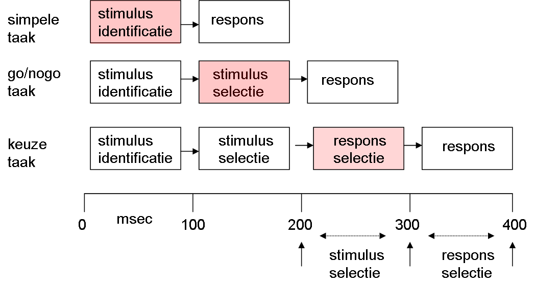 eigen gemakte tekening, geen auteursrechten vereist